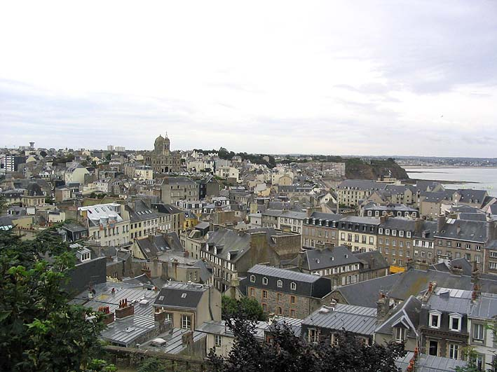 Vue générale de Granville Jean Tosti 08/2004